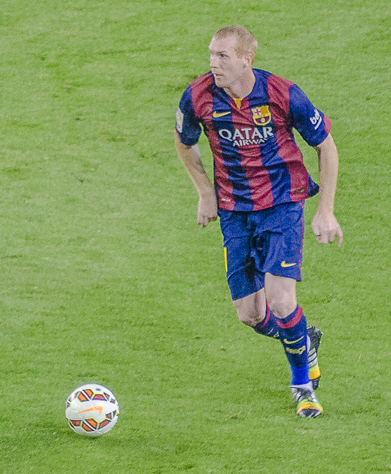 Jeremy Mathieu playing for FC Barcelona. Barça - Eibar, 18.10.2014